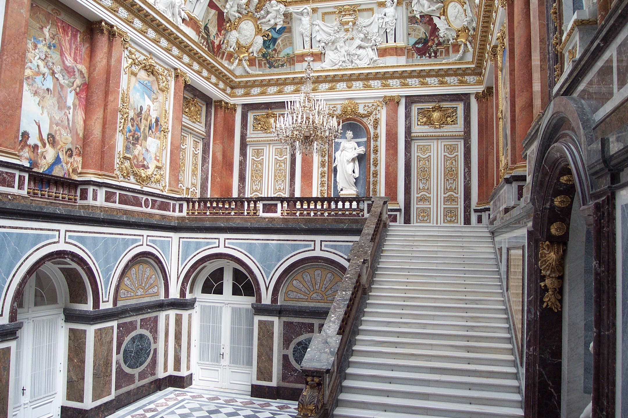 Neues Schloss Herrenchiemsee, Gesandtentreppe